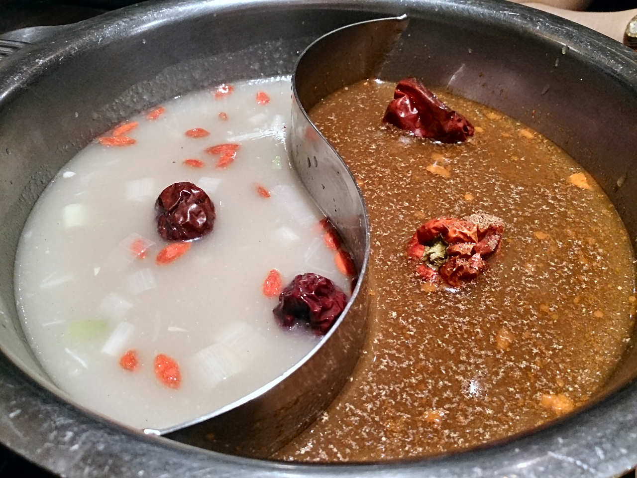 中央を太極の「陰陽」に見立てて区切られた丸い「鴛鴦（おしどり）火鍋」（ユアンヤンフオグオ）